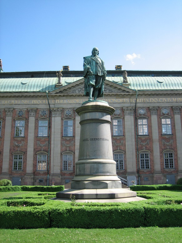 Staty föreställande Axel Oxenstierna. Riddarhuset, Stockholm.